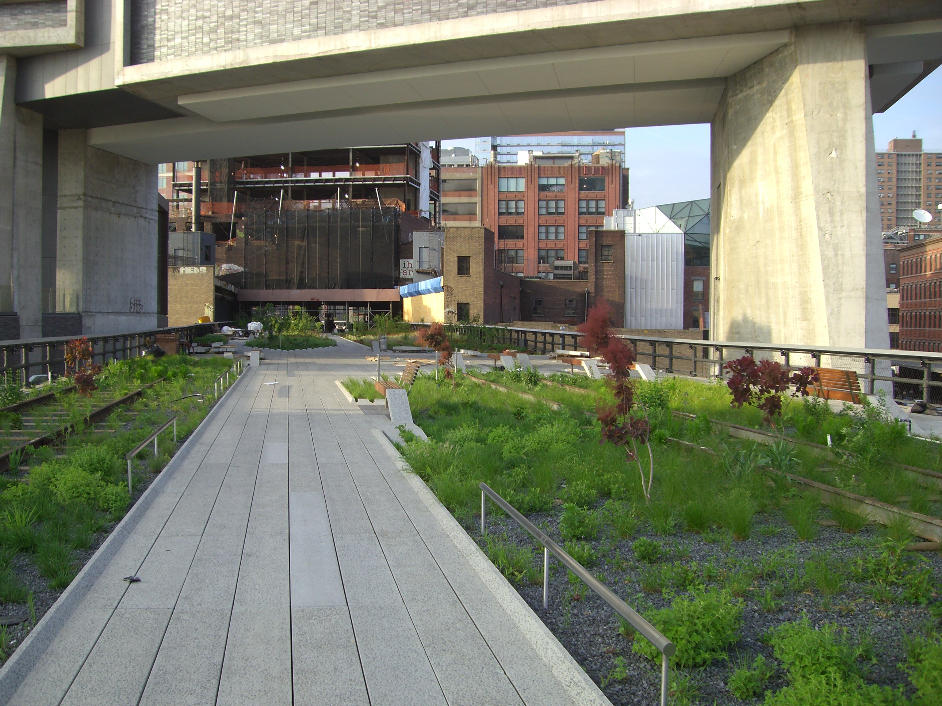 Baustelle High Line Park Mai 2009 kurz vor der Eröffnung des ersten Abschnitts